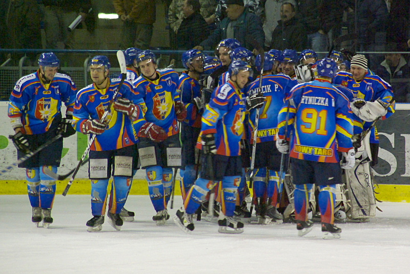 Drużyna MMKS Podhale Nowy Targ po zdobyciu 5. miejsca w PLH (Arena Sanok, 20.03.2011)